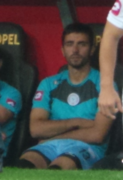 Eray Birniçan